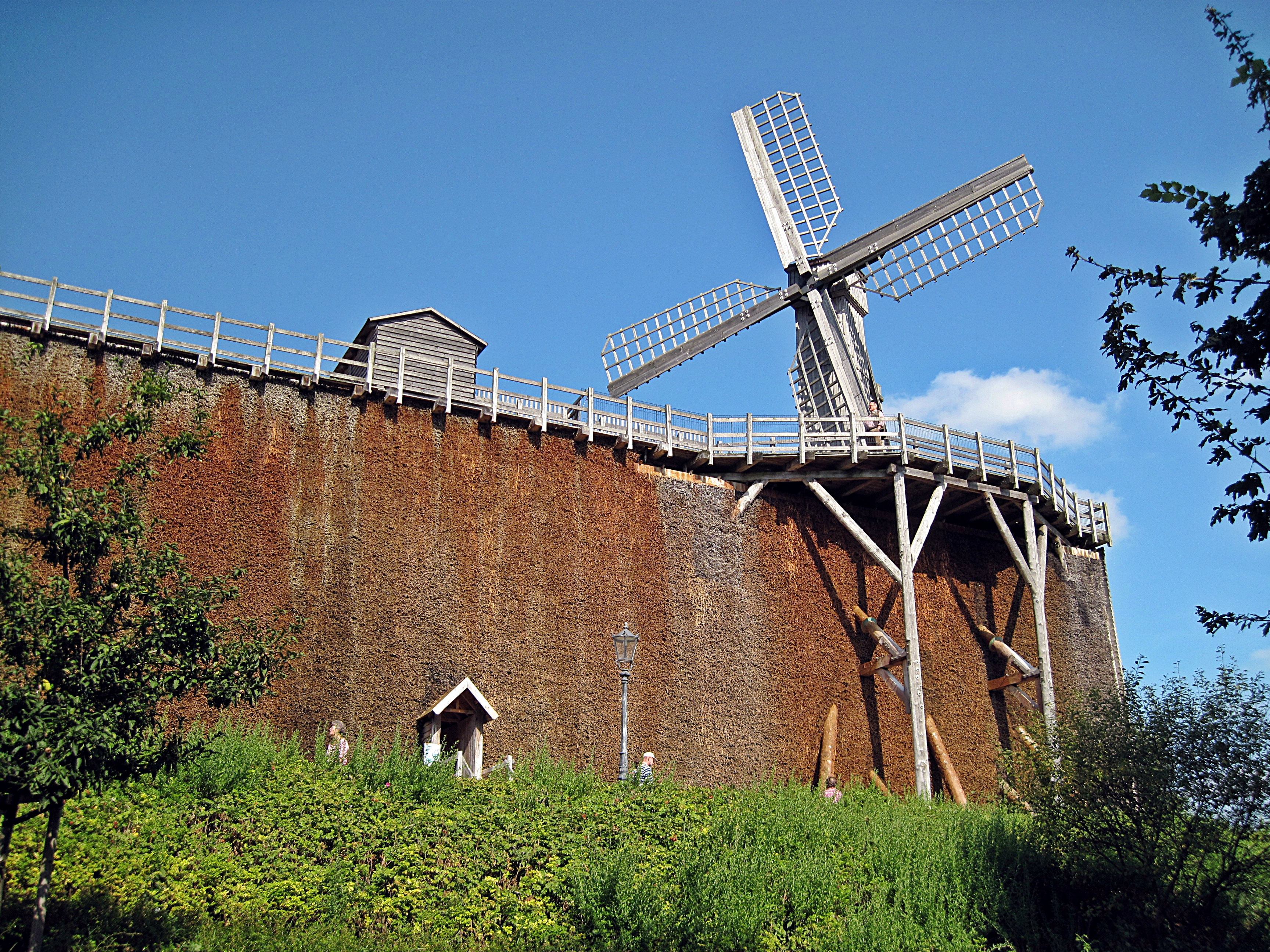 Bad Rothenfelde, Gradierwerk und Windmühle